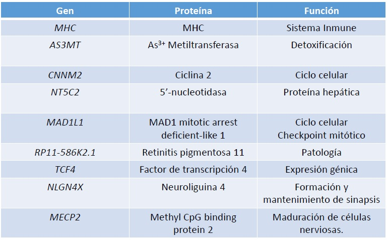 Genes implicados en esquizofrenia